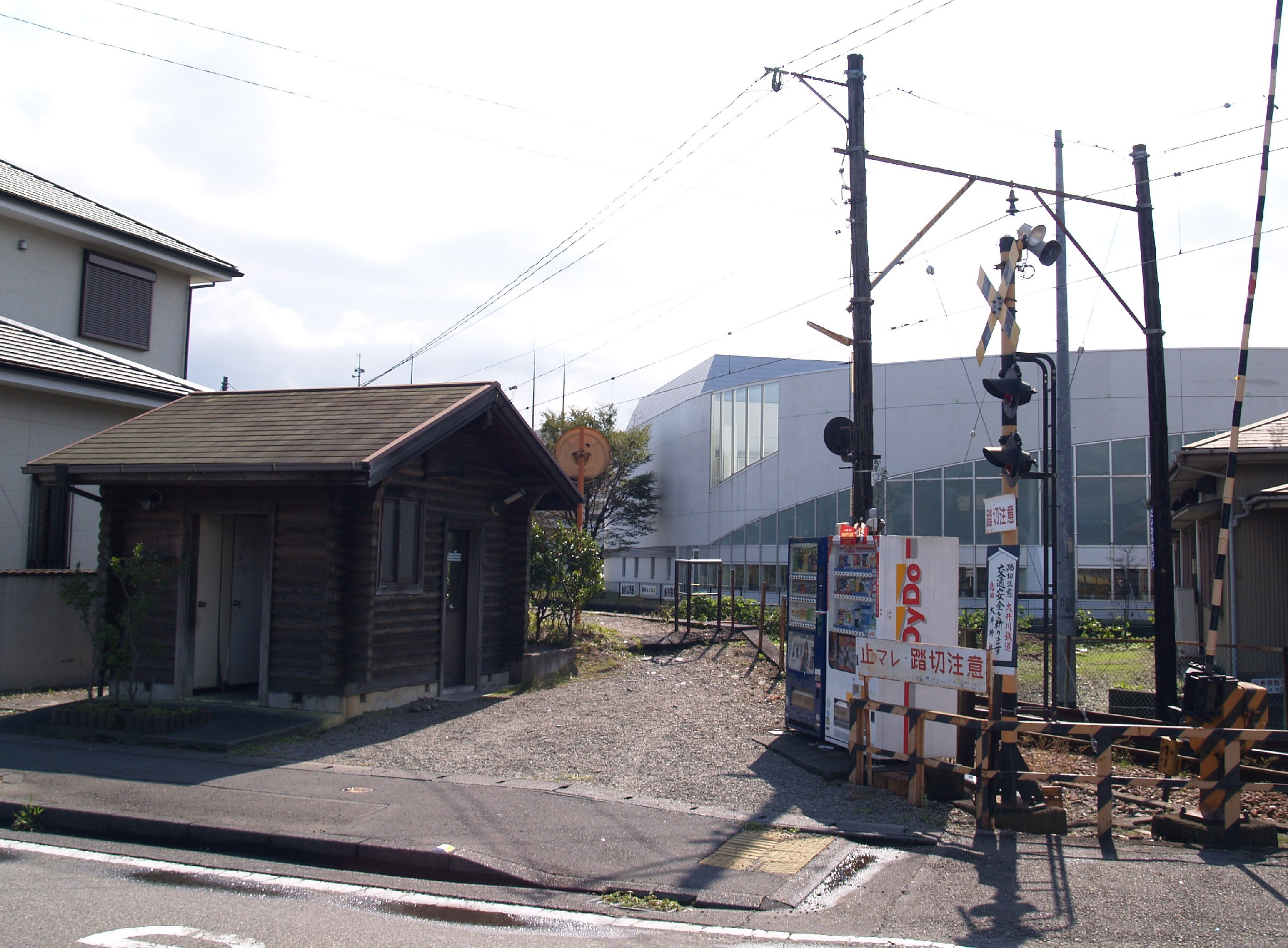 代官町駅